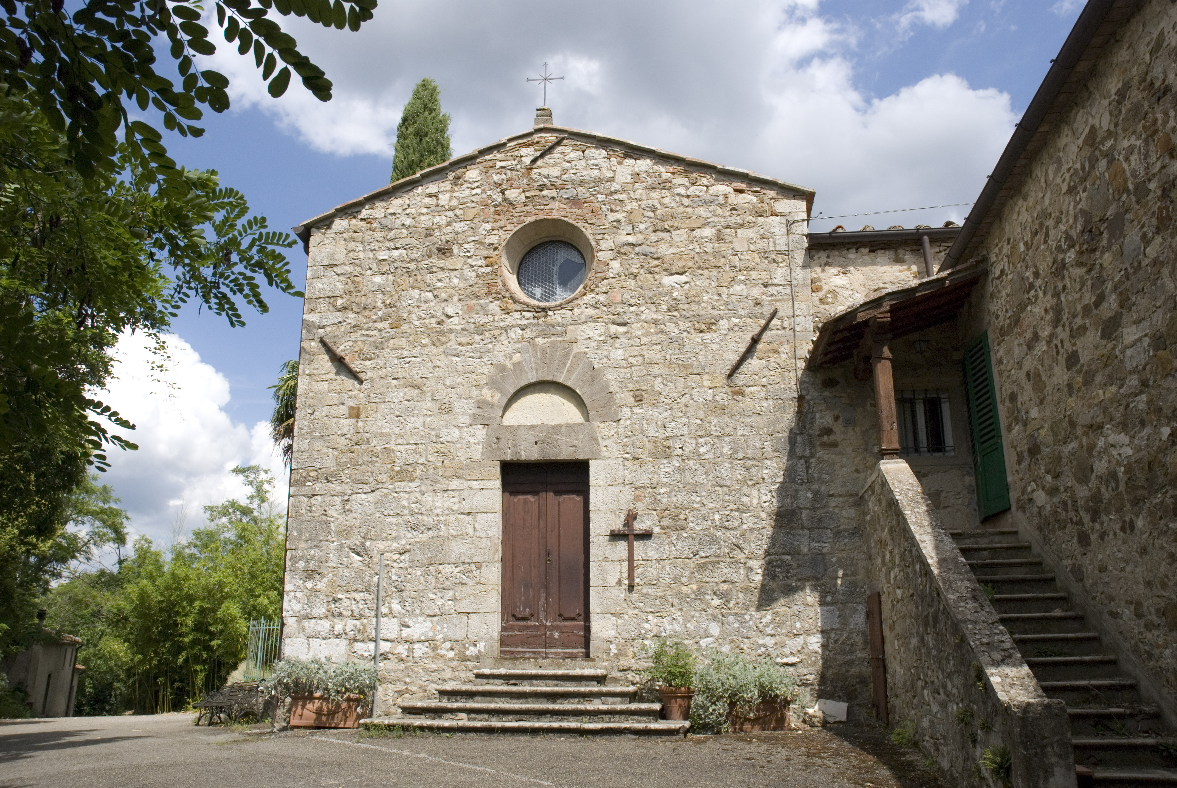 Chiesa di San Giorgio alla Piazza